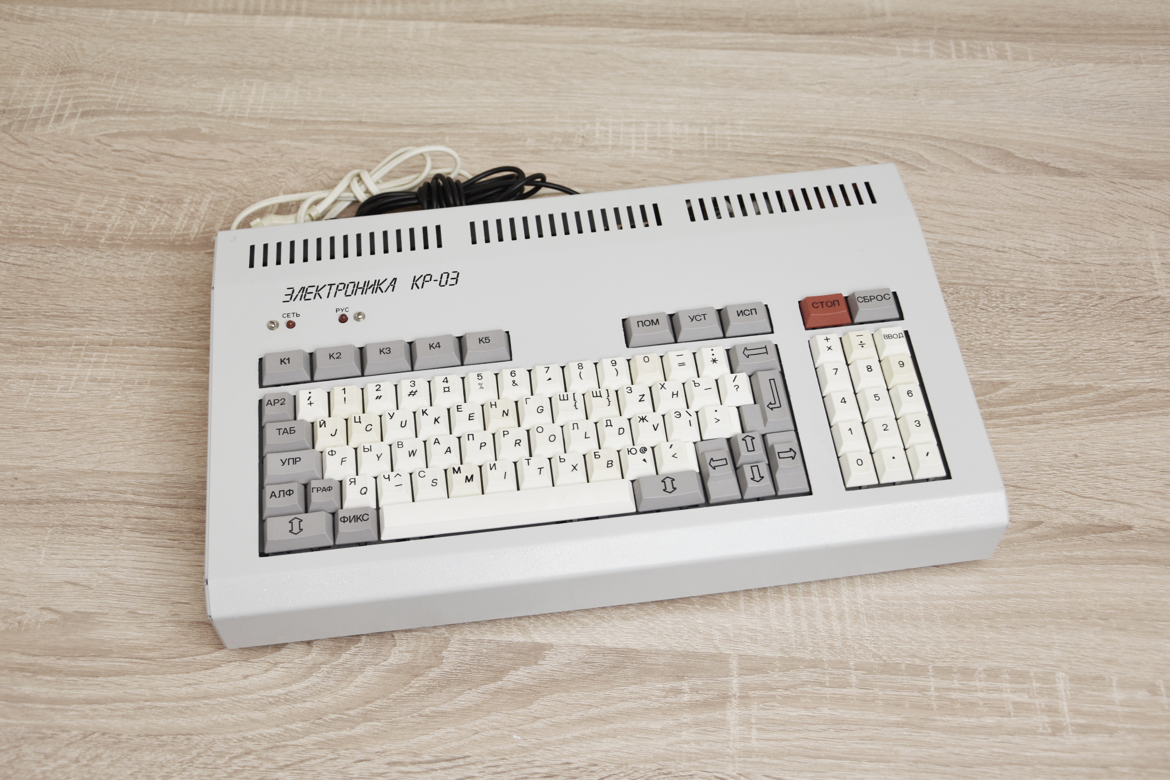 Компьютер Электроника КР-03 в собранном виде.